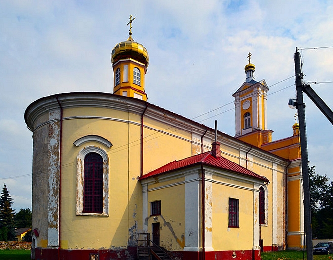 Беларуская (тарашкевіца): Петрапаўлаўская царква (Ружаны) This is a photo of Belarusian heritage monument. Reference number: 112Г000643 ( WLM)